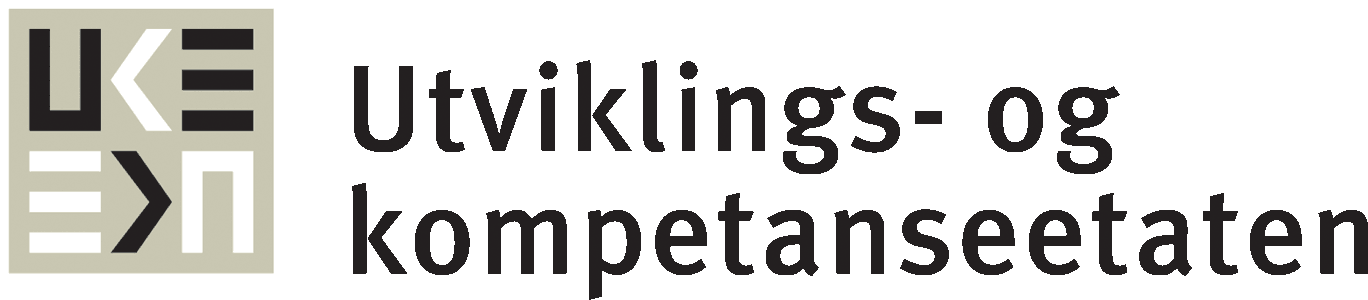 UKEs logo.